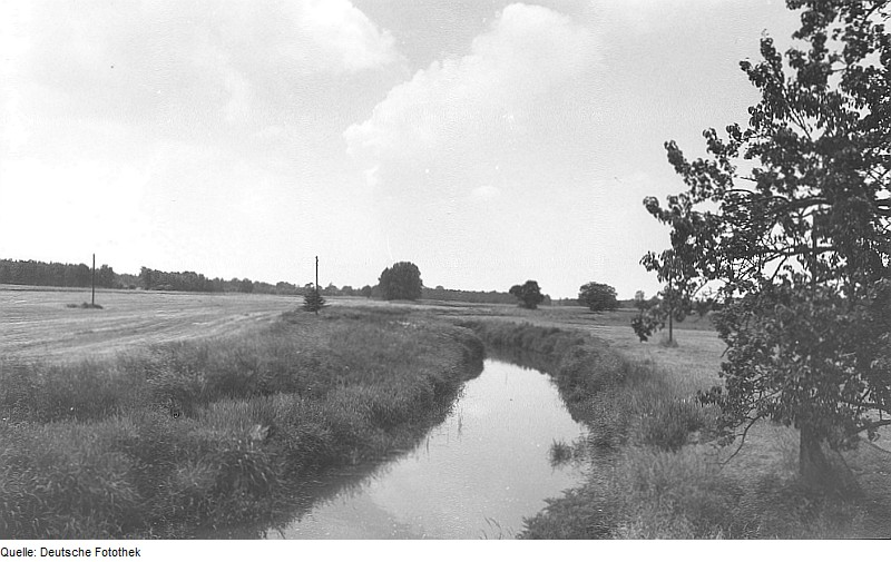 Original image description from the Deutsche Fotothek Rietschen-Viereichen. Weißer Schöps gegen Mocholz